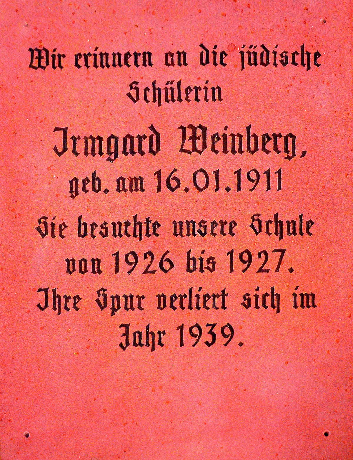 Noch nicht (wieder?) angebrachte Gedenktafel im Blindenmuseum des Landesbildungszentrums für Blinde in Hannover mit der Inschrift „Wir erinnern an die jüdische Schülerin Irmgard Weinberg geb. am 16. 01. 1911. Sie besuchte unsere Schule von 1926 bis 1927. Ihre Spur verliert sich im Jahr 1939.“ Die Tafel wurde liegend fotografiert und anschließend mit dem kostenlosen Foto-Bearbeitungs-Programm Gimp perspektivisch entzerrt. Sie ist daher hier nicht vollständig und maßstabsgetreu wiedergegeben ...